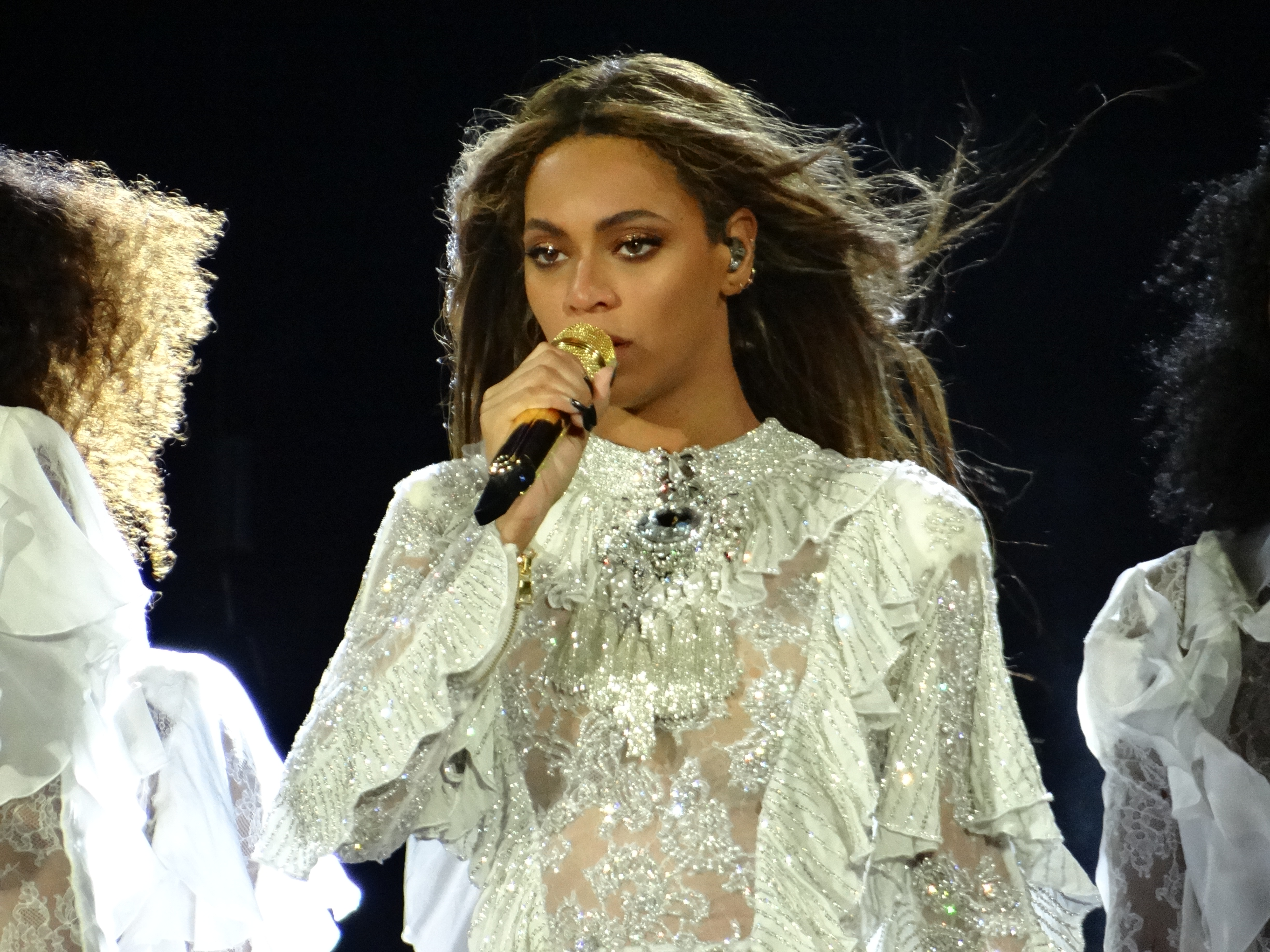 Beyonce durante el Formation tour en carolina del norte